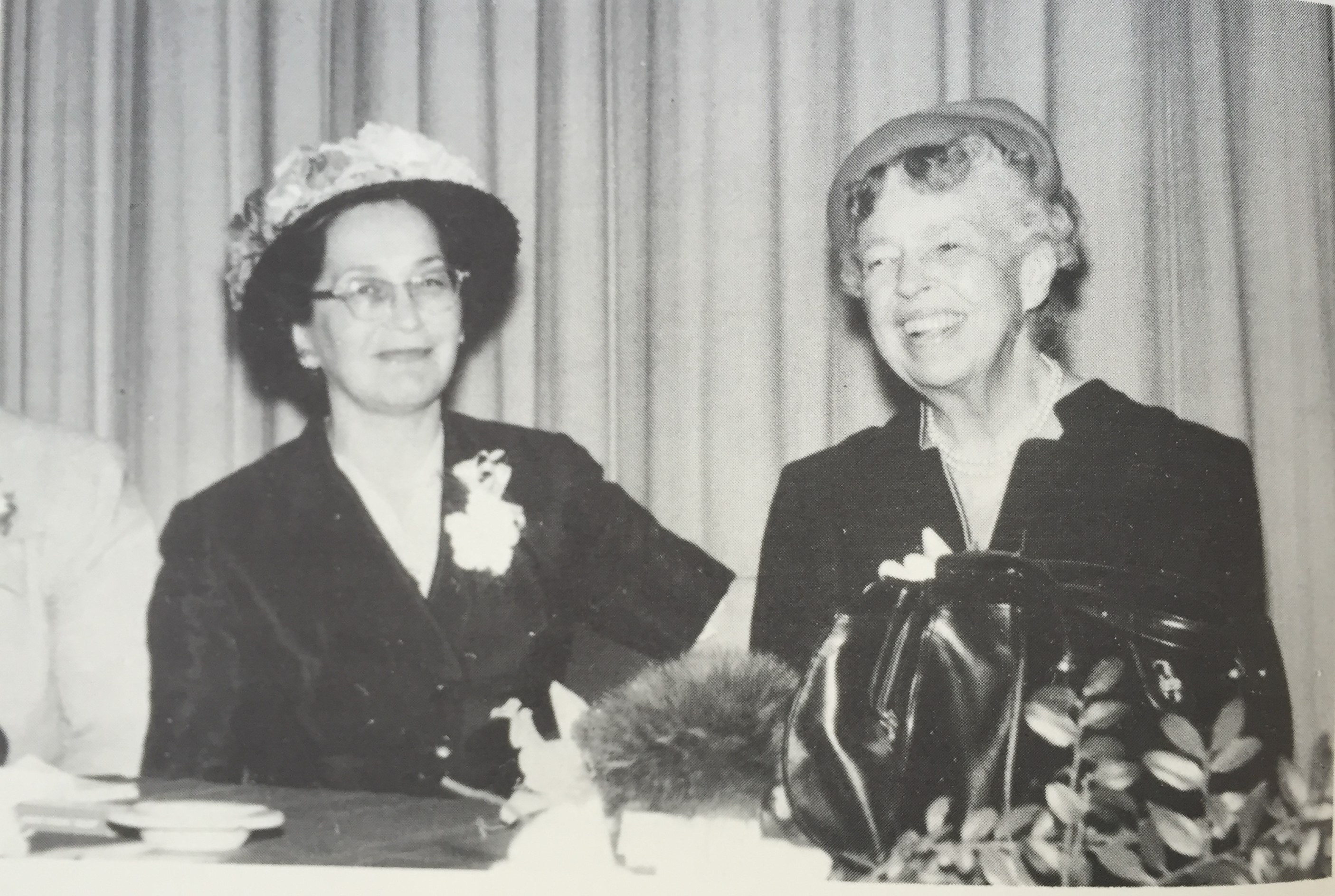 1957 במהלך כנס עליית הנוער, אפריל